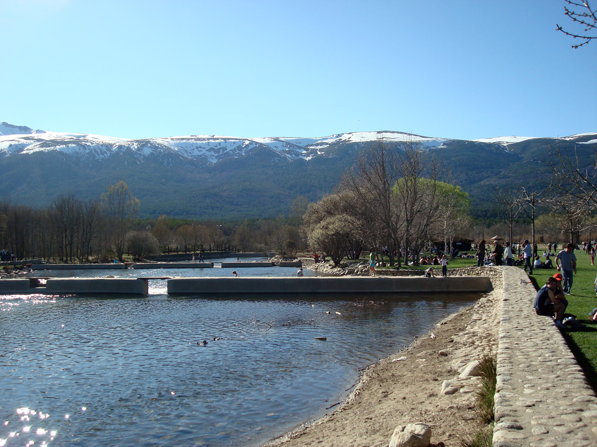 Las Presillas es un área recreativa del río Lozoya situada a la altura de Rascafría.